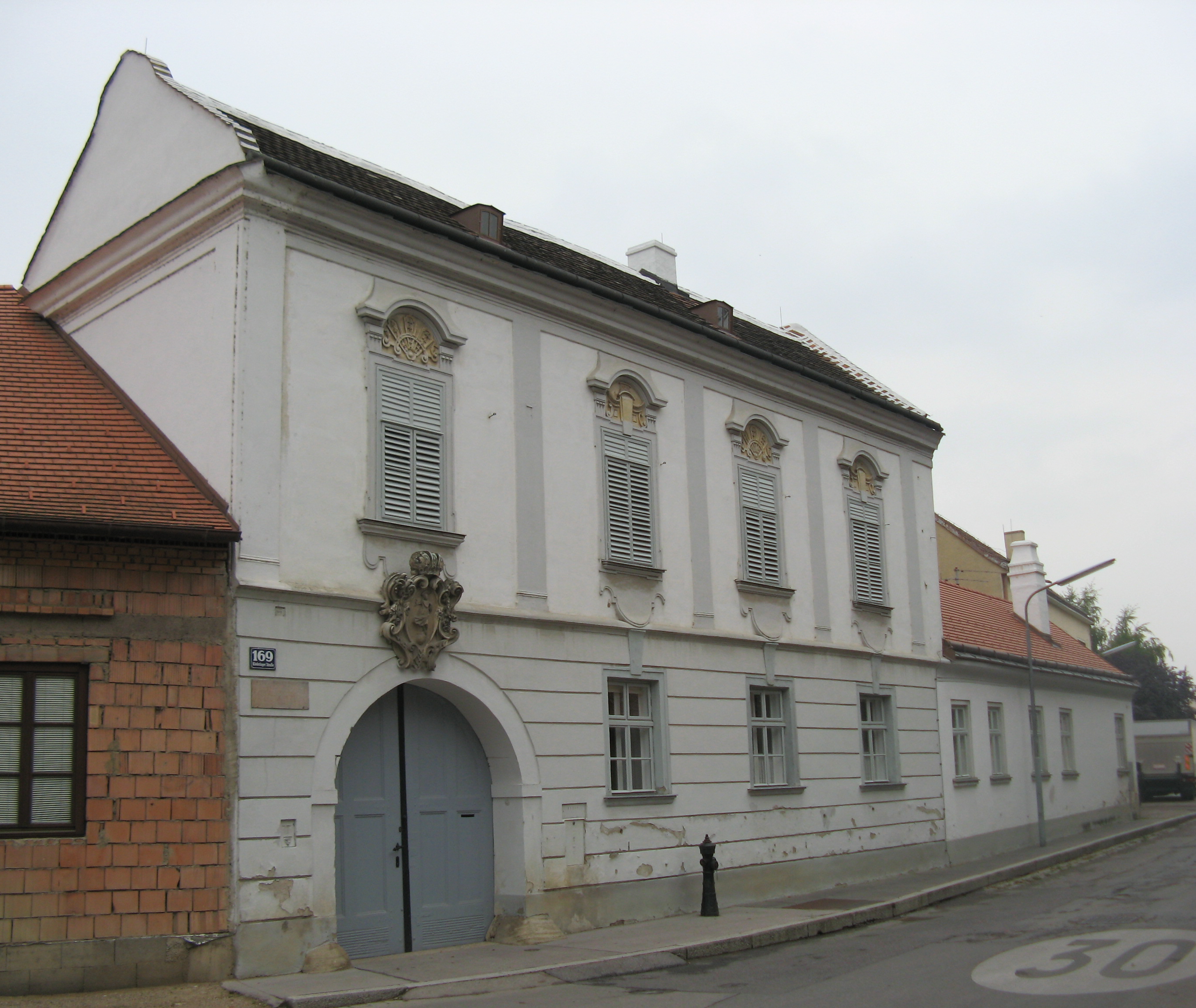 Prentlhof (18. Jh.), Klederinger Straße 169, Unterlaa, Wien-Favoriten